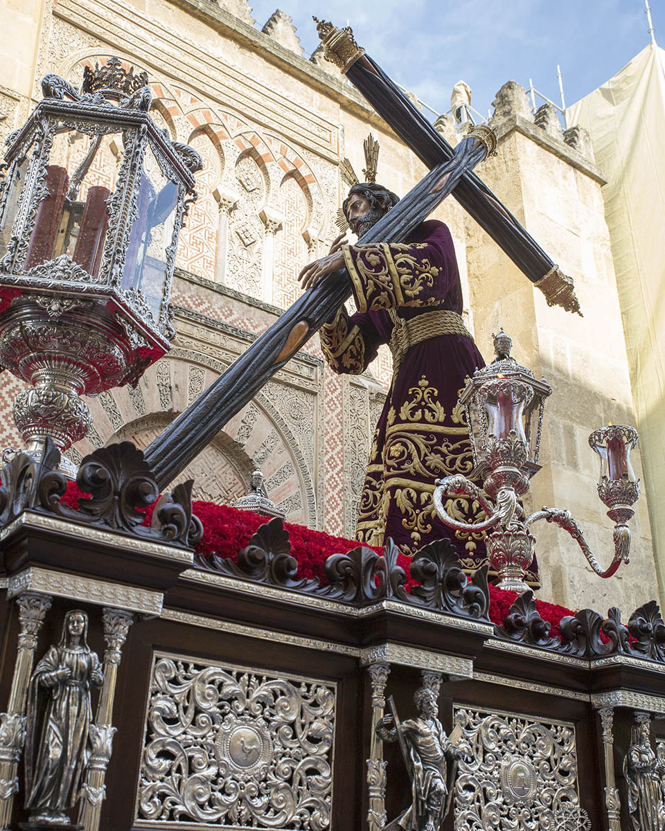 Cristo de la Hermandad de La Vera-Cruz en Córdoba en la Mezquita